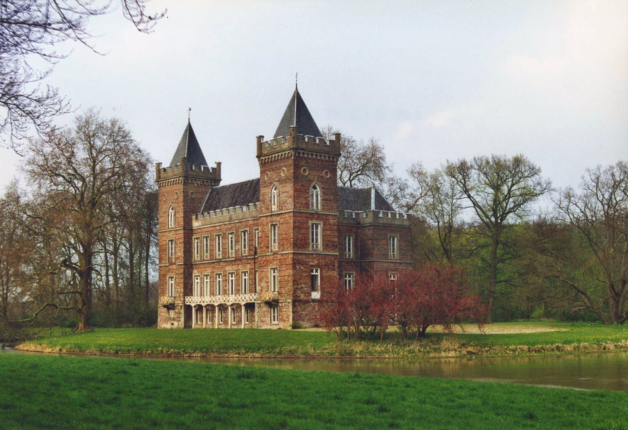 Het park bij ridderhofstad Beverweert te Werkhoven.